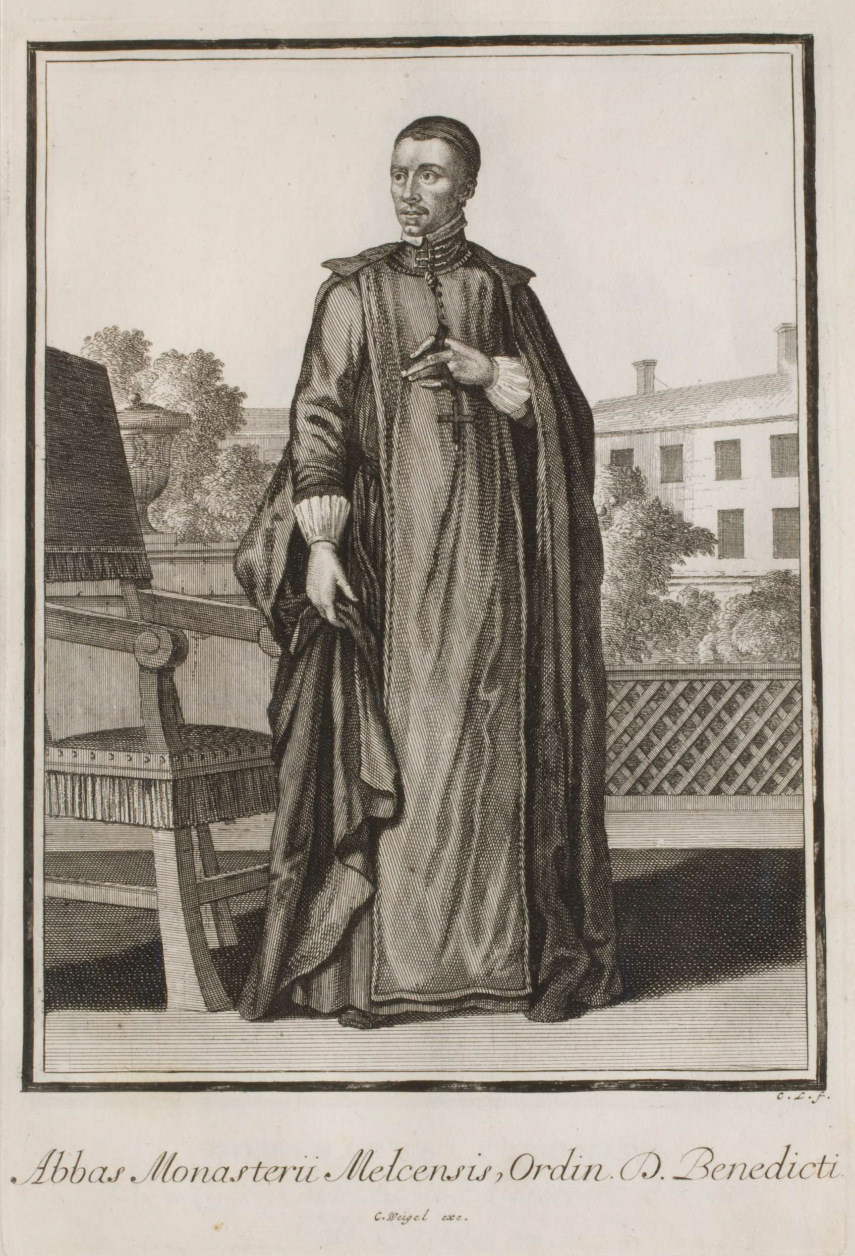 Neu-eröffnete Welt-Galleria. ..., Nürnberg 1703. 16. Abbas Monasterii Melcensis, Ordin. S. Benedicti. Abt Berthold Dietmayr